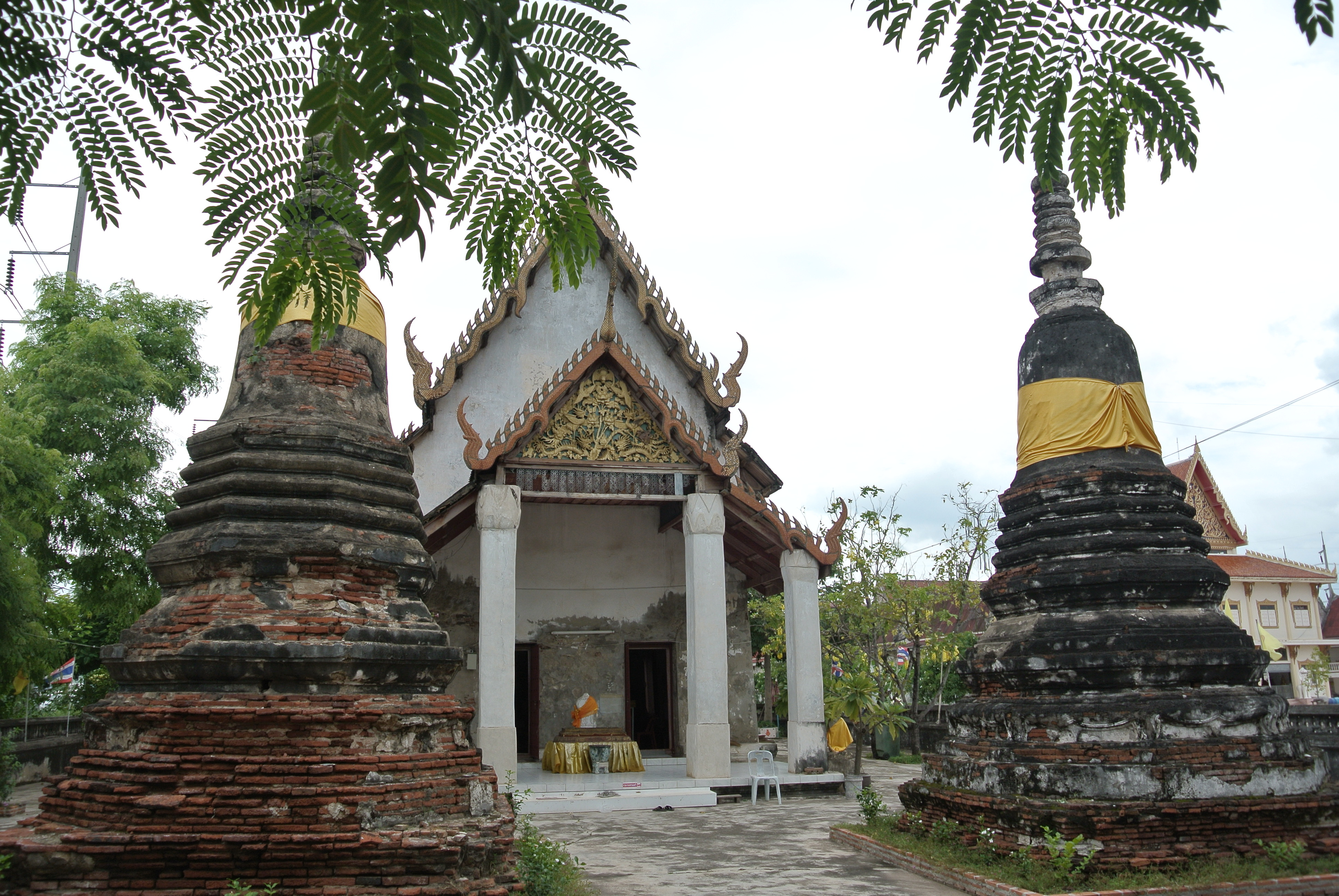 วัดโคกขาม โคกขาม เมืองสมุทรสาคร ทะเบียน 7401-02-0008